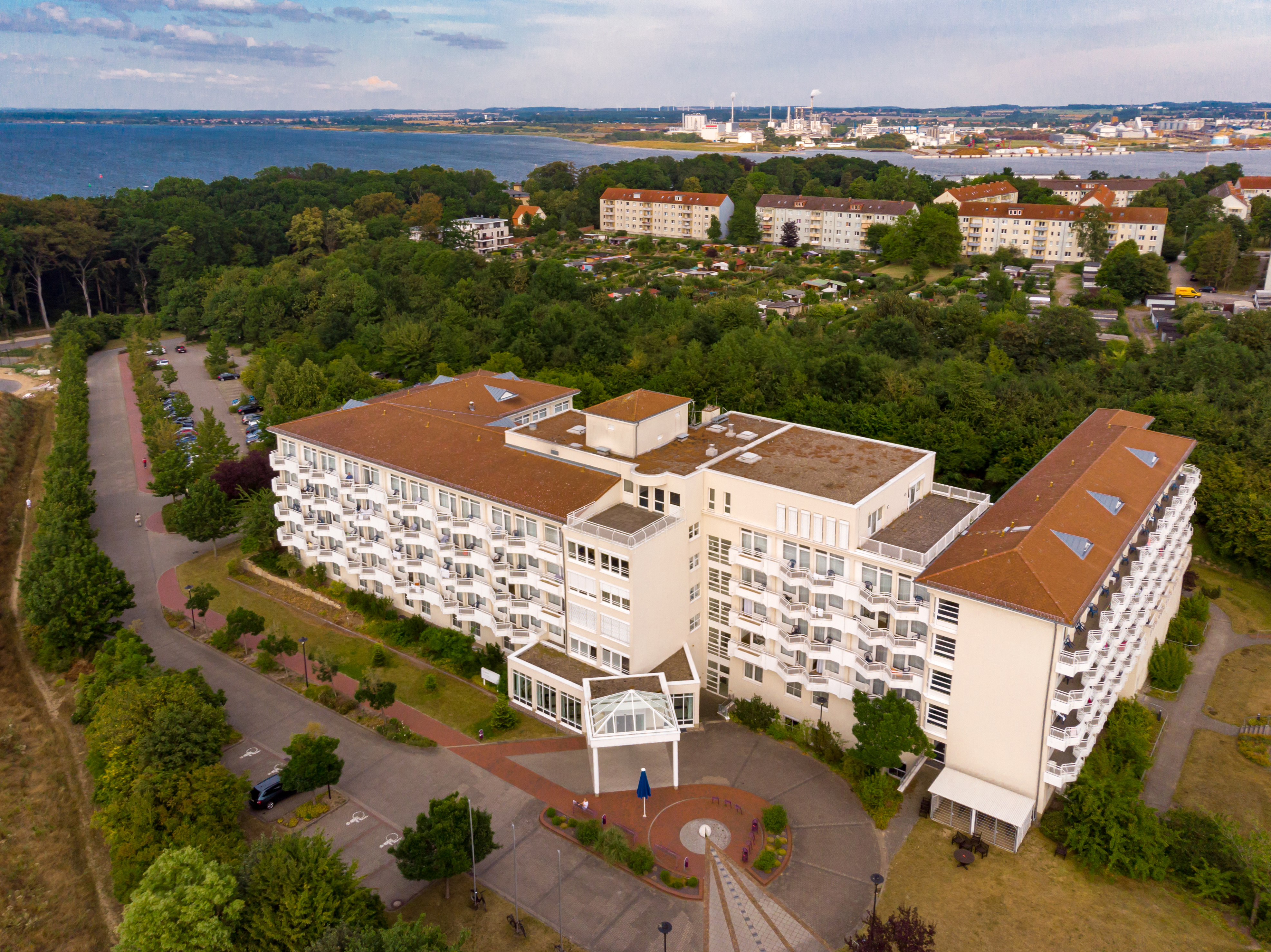 Median-Klinik Wismar Wendorf